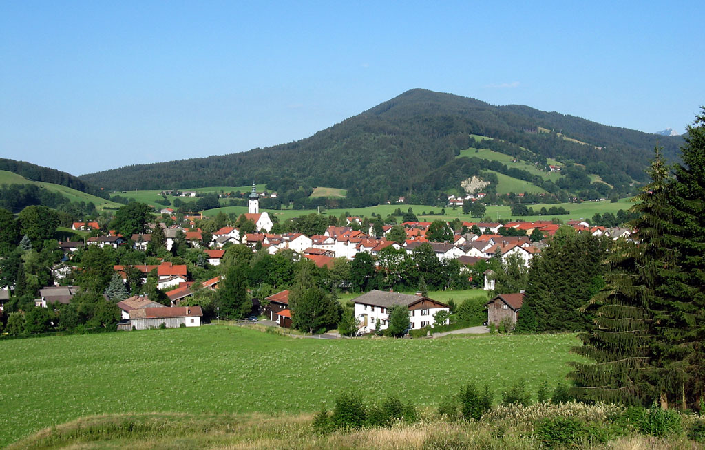 Blick auf die Gemeinde Hausham im Juli 2003